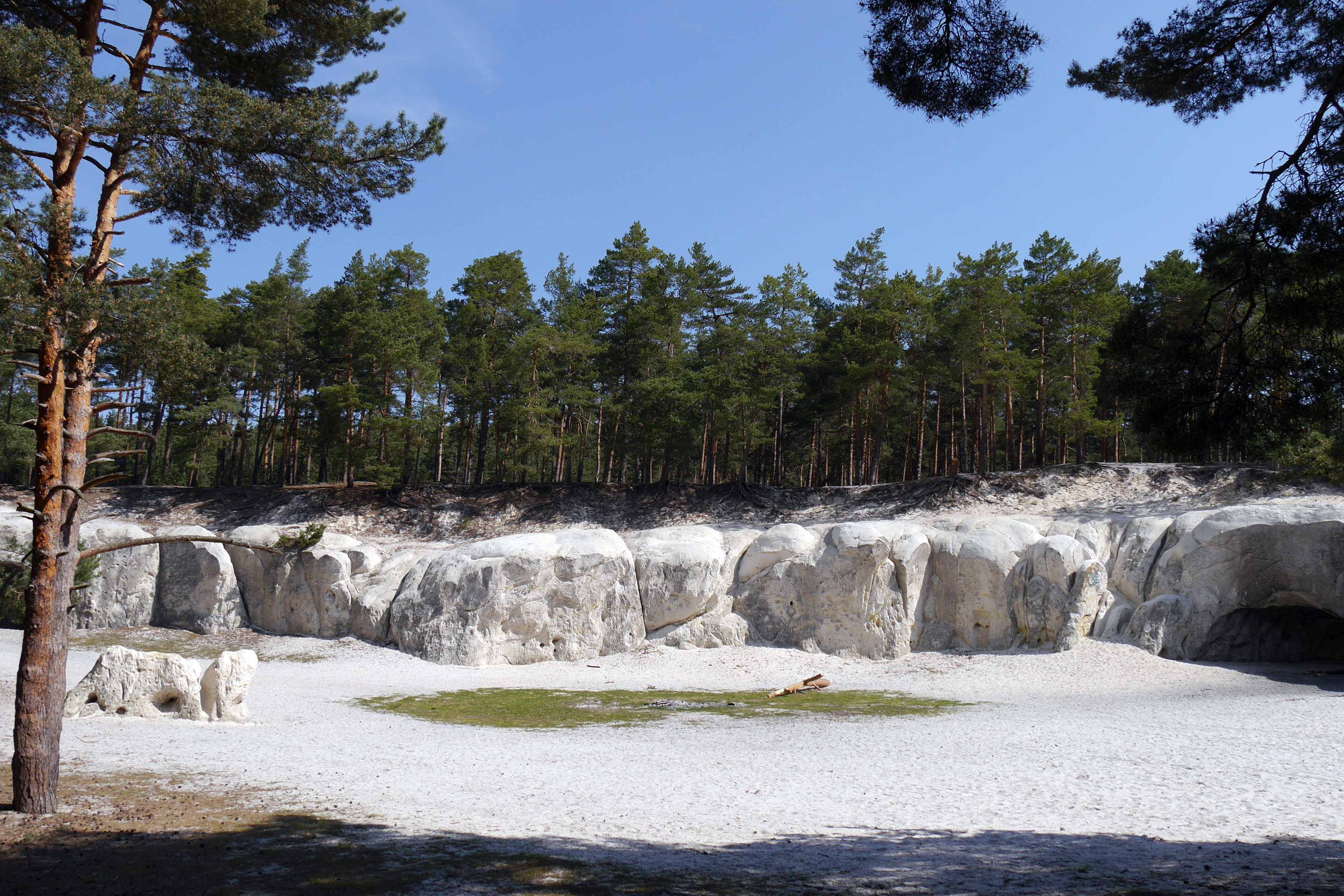 Diese Höhlen aus weißem Sandstein liegen am Fuße des Regensteins bei Blankenburg / Harz.